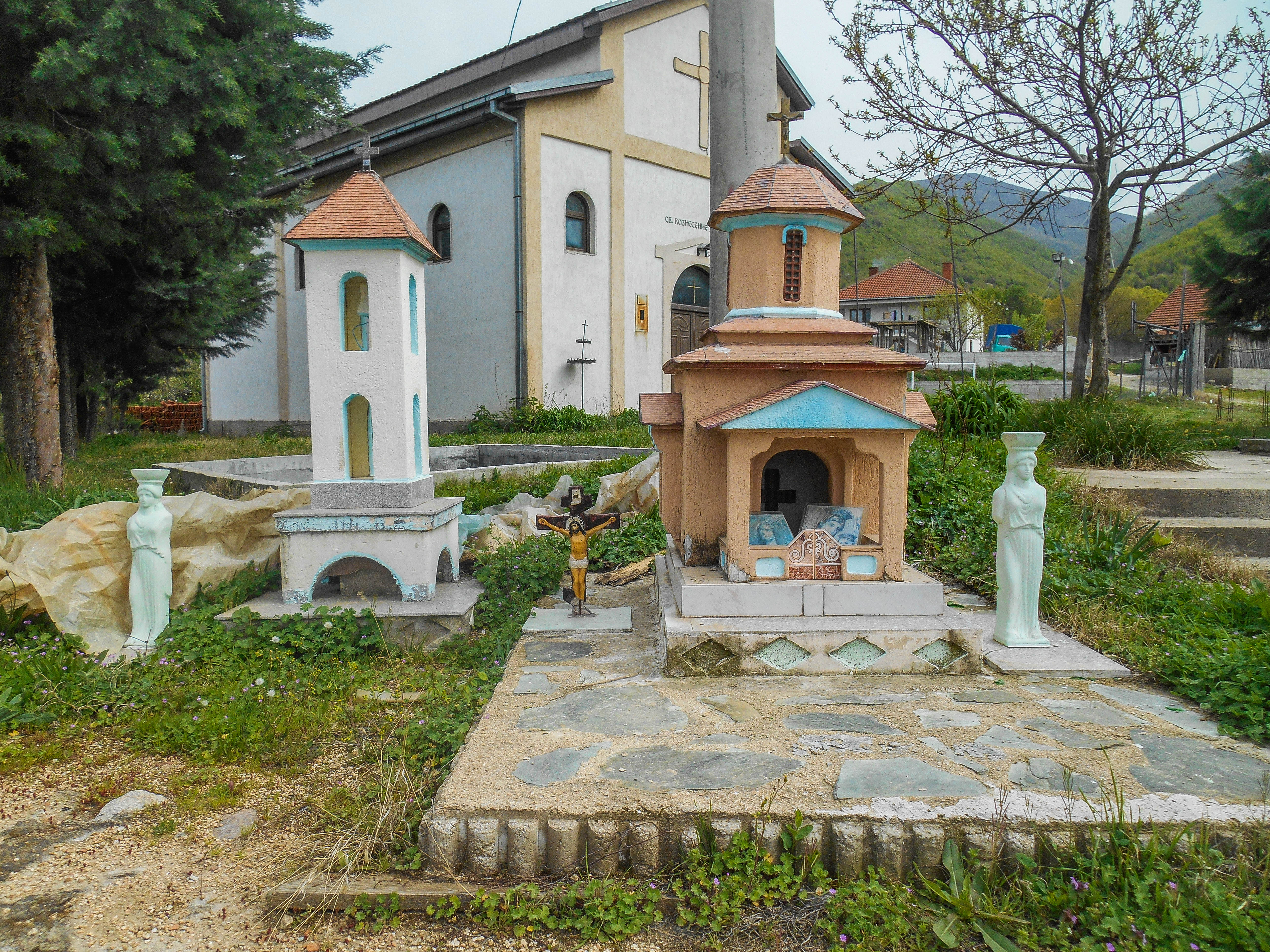 Црквата во Свидовица